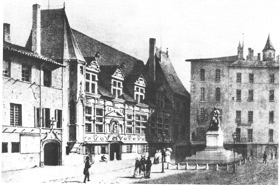 Parlement de Grenoble vers 1840, avant son agrandissement de 1890.